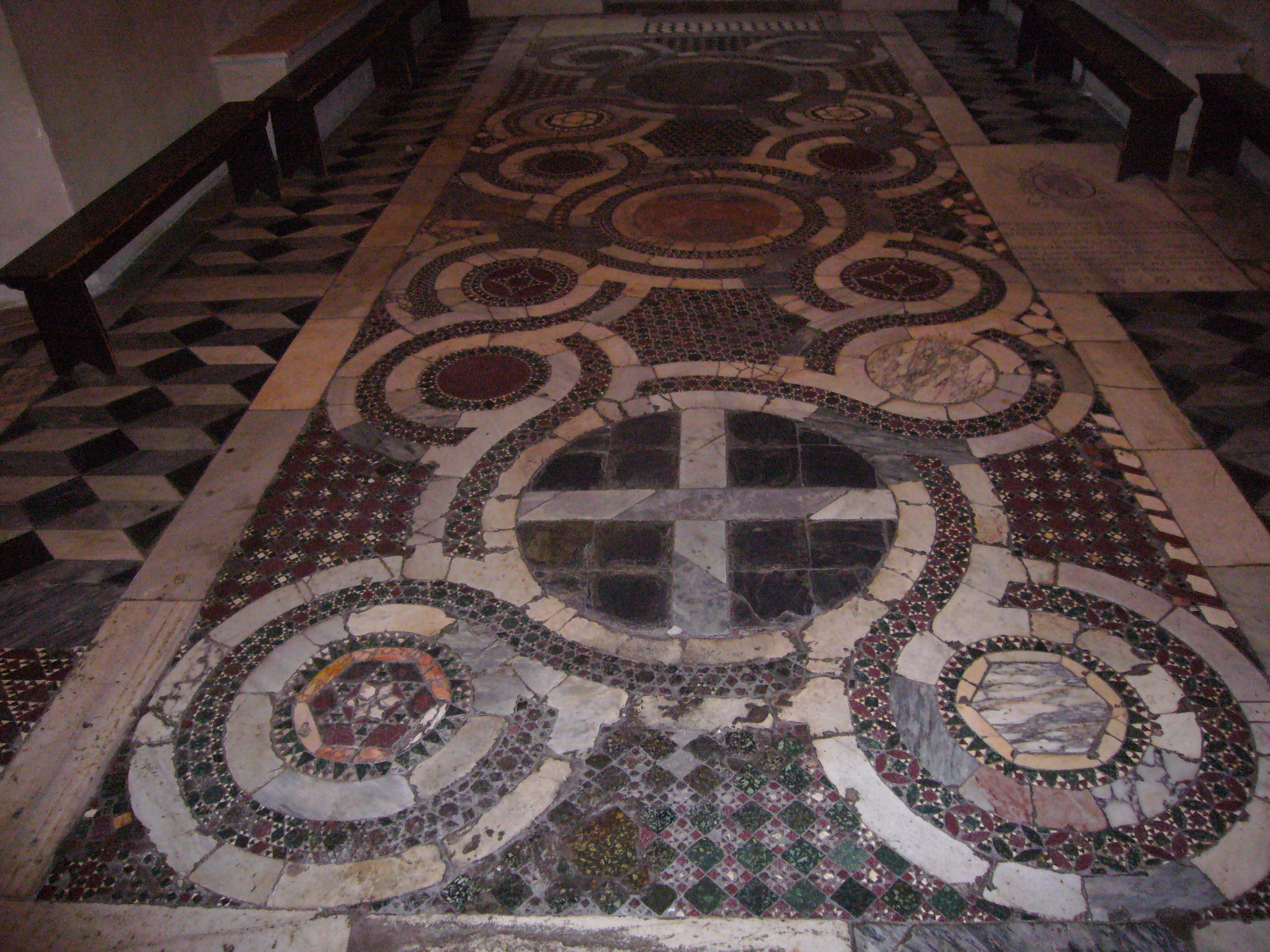 Roma, Santi Quattro Coronati: oratorio di S. Silvestro - pavimento cosmatesco